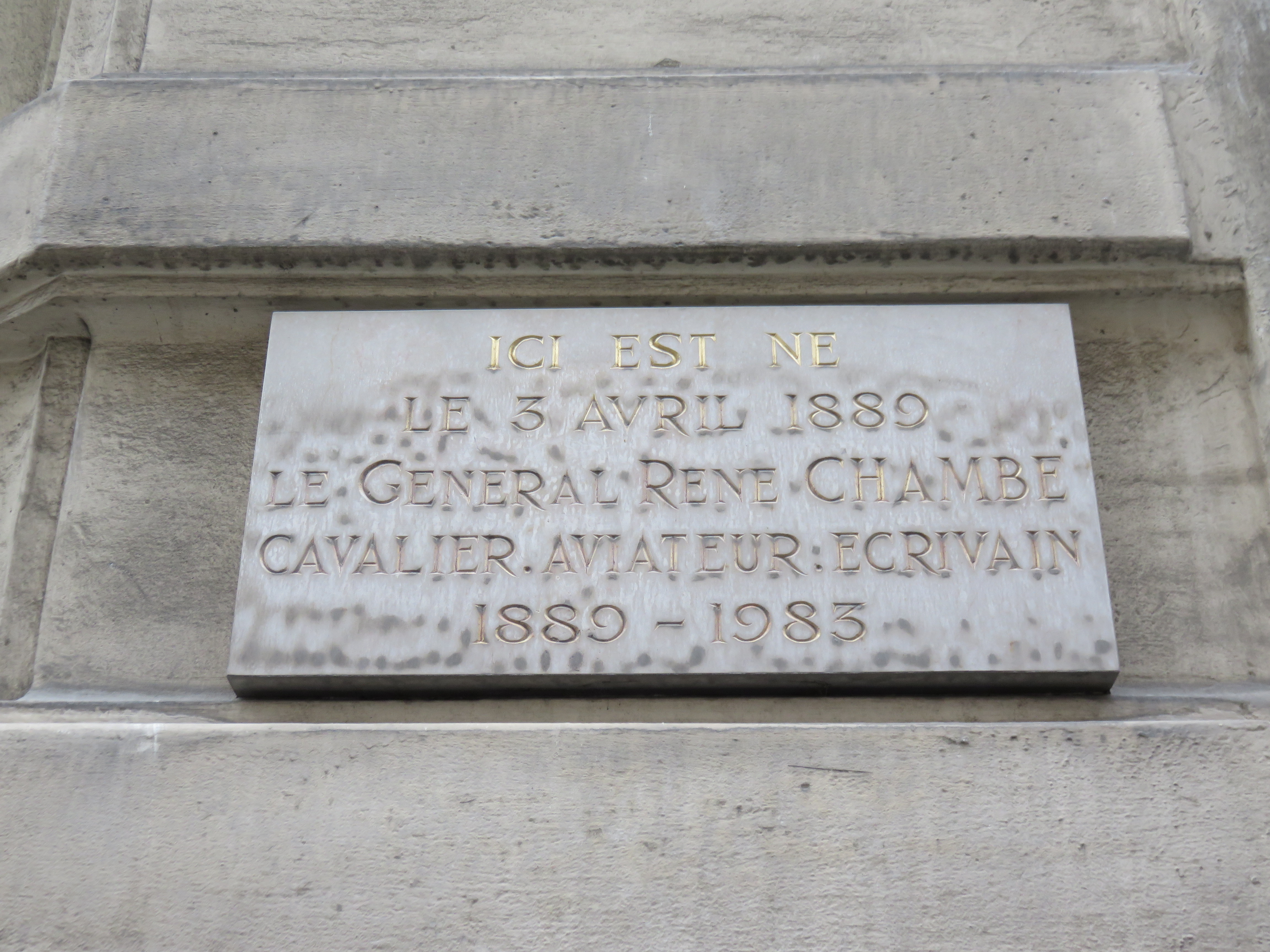 Plaque commémorant la naissance du Général René Chambe, au 12 rue Jarente, dans le 2e arrondissement de Lyon.